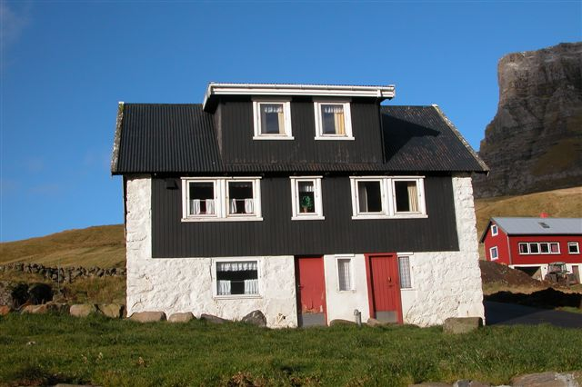 Gásadalur, Faroe Islands